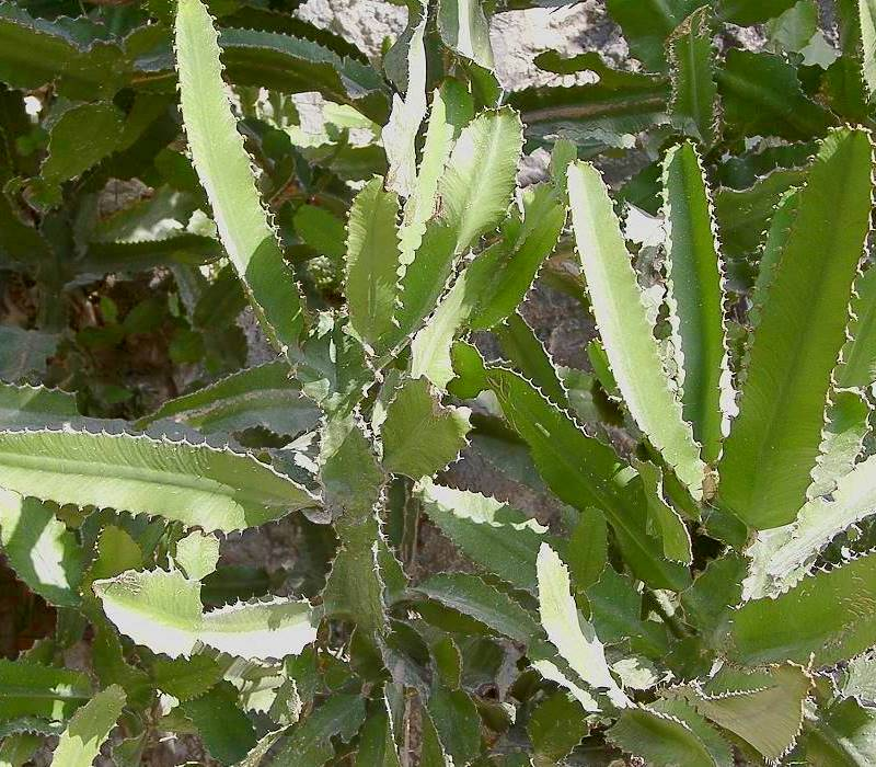 Euphorbia dawei Jardin Exotique, Monaco